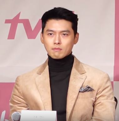 tvN 토일드라마 '사랑의 불시착' 제작발표회가 9일 오후 서울 종로구 포시즌스 호텔 서울에서 열렸다.